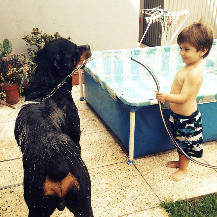 Antrozoología